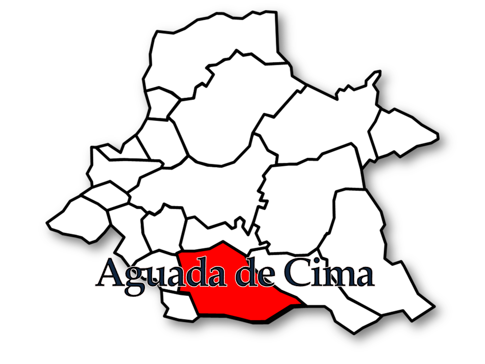 Censos 1864/2011